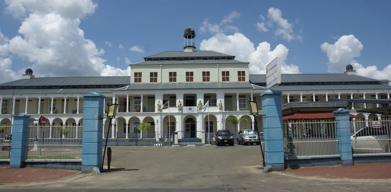 St Vincentiusziekenhuis, Koninginnestraat 4, Paramaribo, Suriname